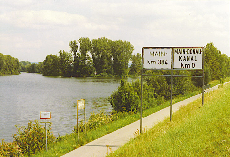 eigen foto